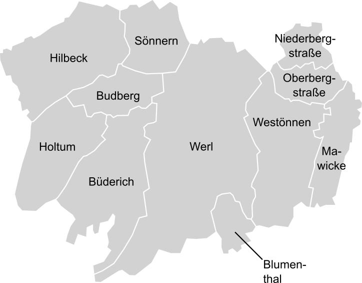 Werl Ortsteile berichtigt